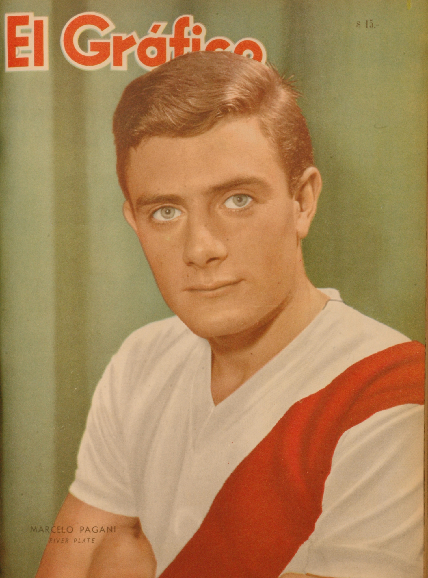 El Grafico del 18 de Abril de 1962. Edicion 2219